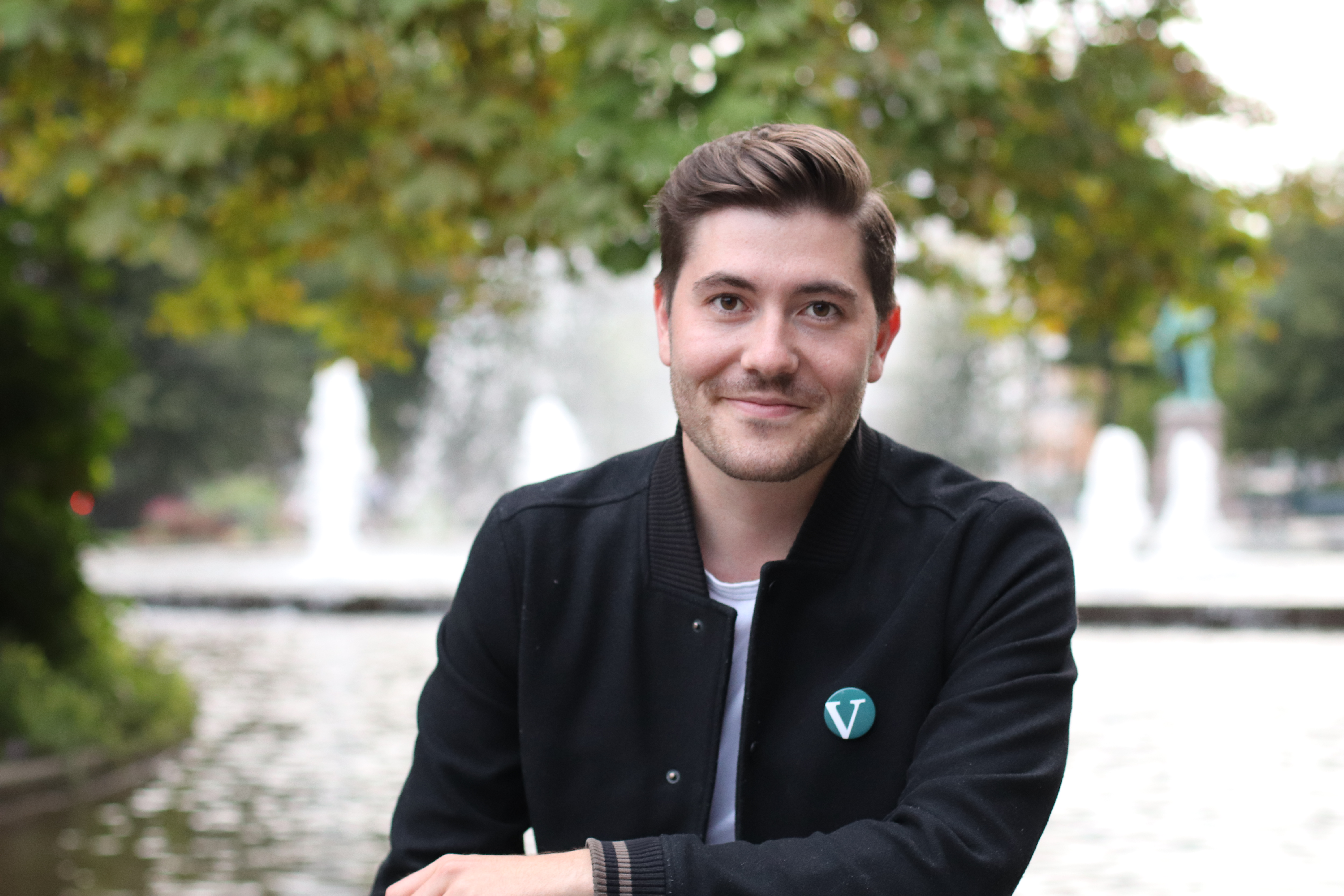 Fotografi av møtende stortingsvara Grunde Kreken Almeland (Venstre)